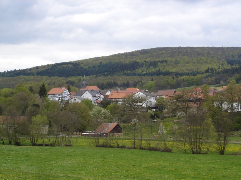 Densberg: Kirche und umliegende Gebäude